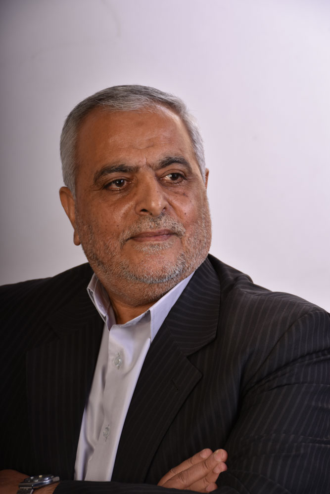 سید حسین حسینی یزدی سیاستمدار اهل کاشمر